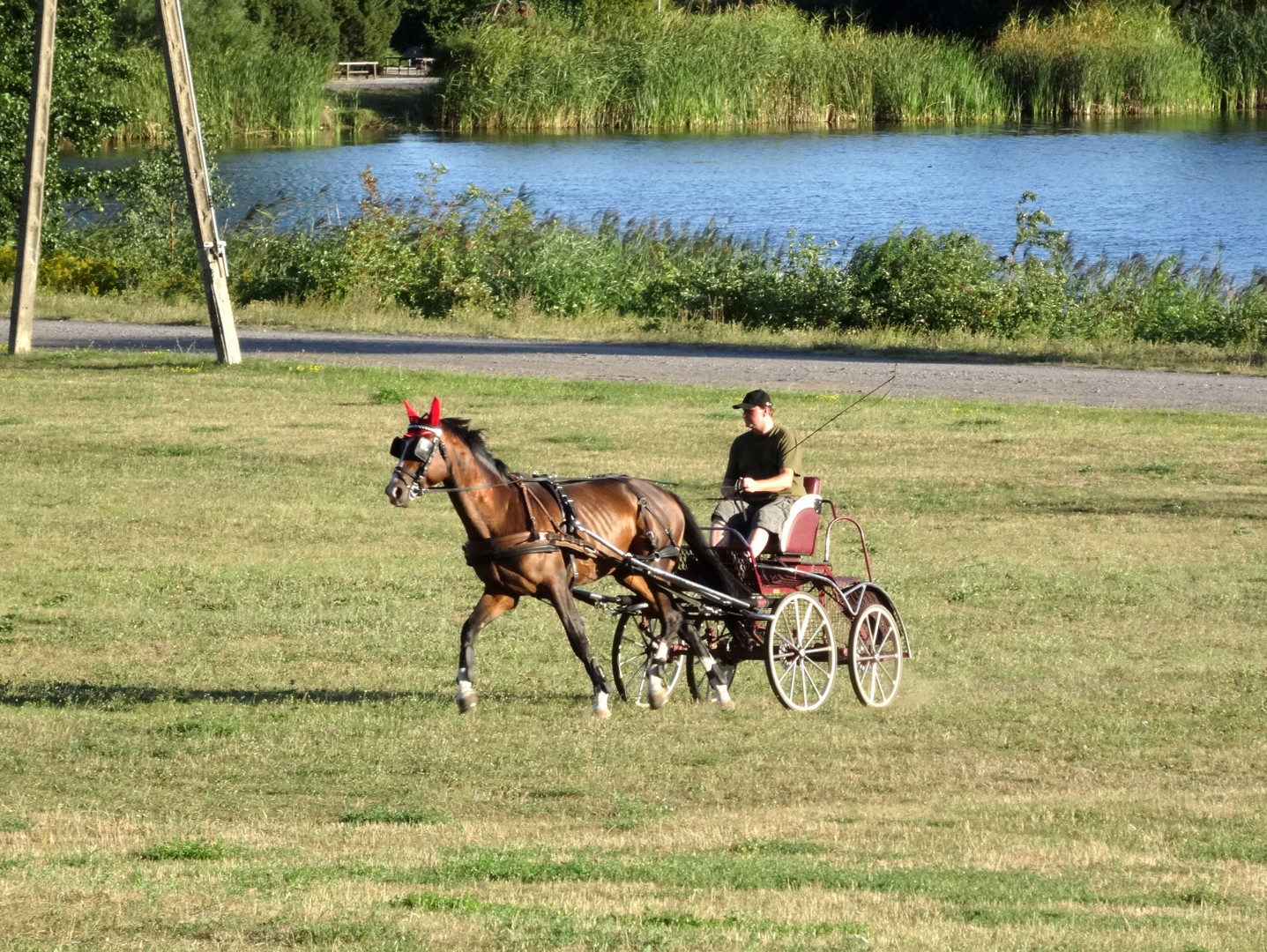 Powożenie w Leśnym Parku Kultury i Wypoczynku w Bydgoszczy